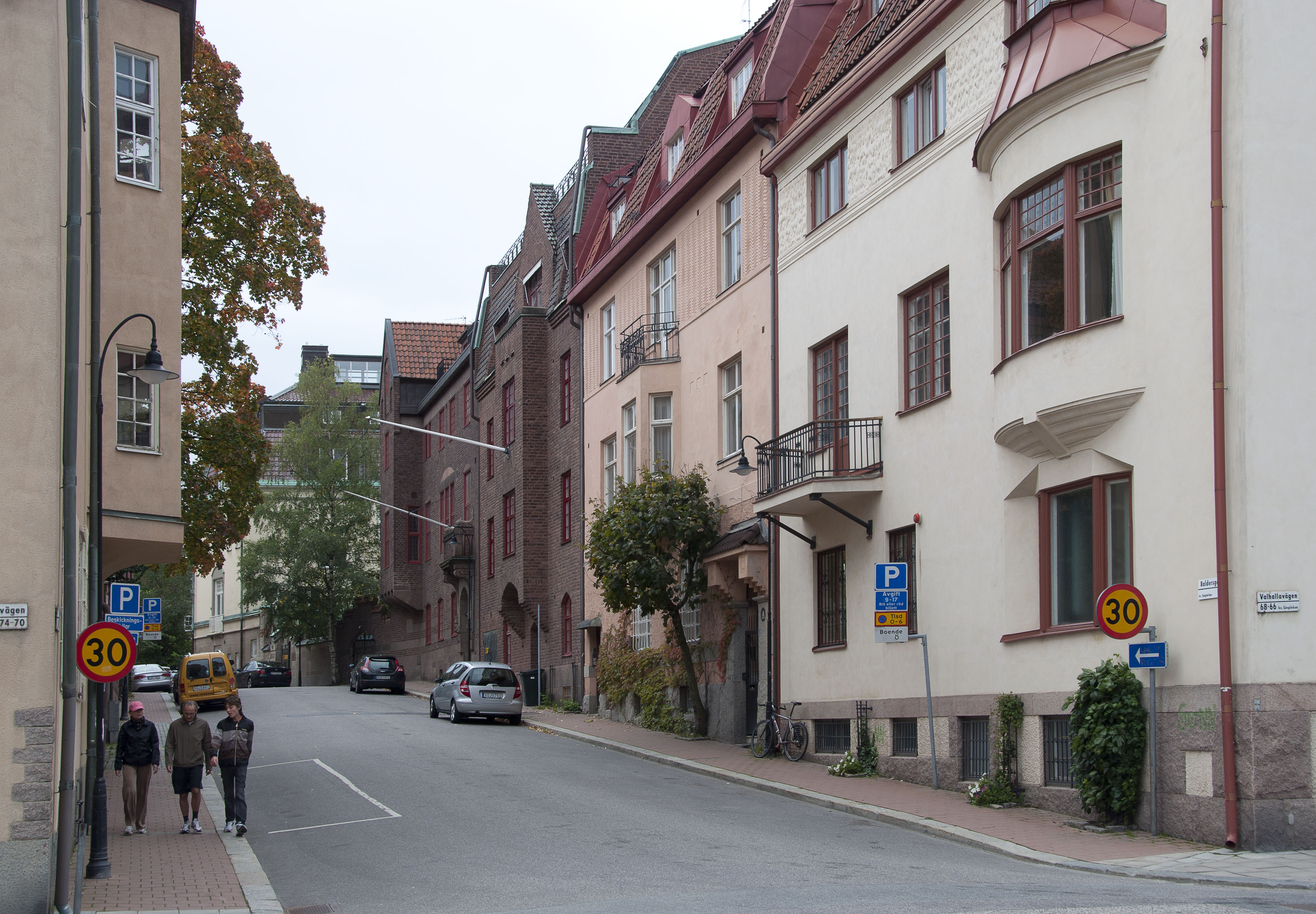 Baldersgatan 3 - 9, Stockholm. Från vänster; Baldersgatan 3 (Sånglärkan 9): Byggnadsår 1909-10, arkitekt Folke Zettervall, byggherre och byggmästare F Dahl. Baldersgatan 5 (Sånglärkan 8): Byggnadsår 1912-13, arkitekt och byggmästare K Holmin (Fredrik Dahlberg fasad), byggherre N Holmin. Baldersgatan 7 (Sånglärkan 7): Byggnadsår 1911-13, arkitekt Ax Andersson, byggherre A Sandrew, byggmästare I Sjösteen. Valhallavägen 68/Baldersgatan 9 (Sånglärkan 6): Byggnadsår 1909-10, arkitekt och byggherre P O Hallman, byggmästare E Lindqvist.